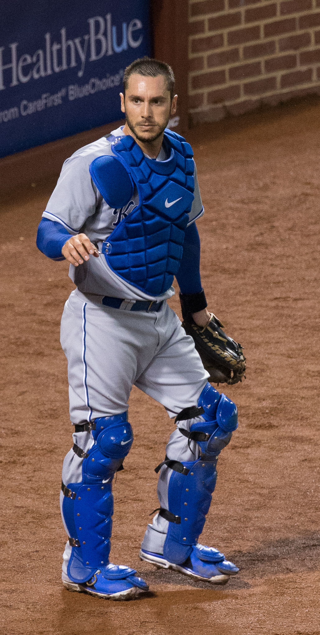 George Kottaras